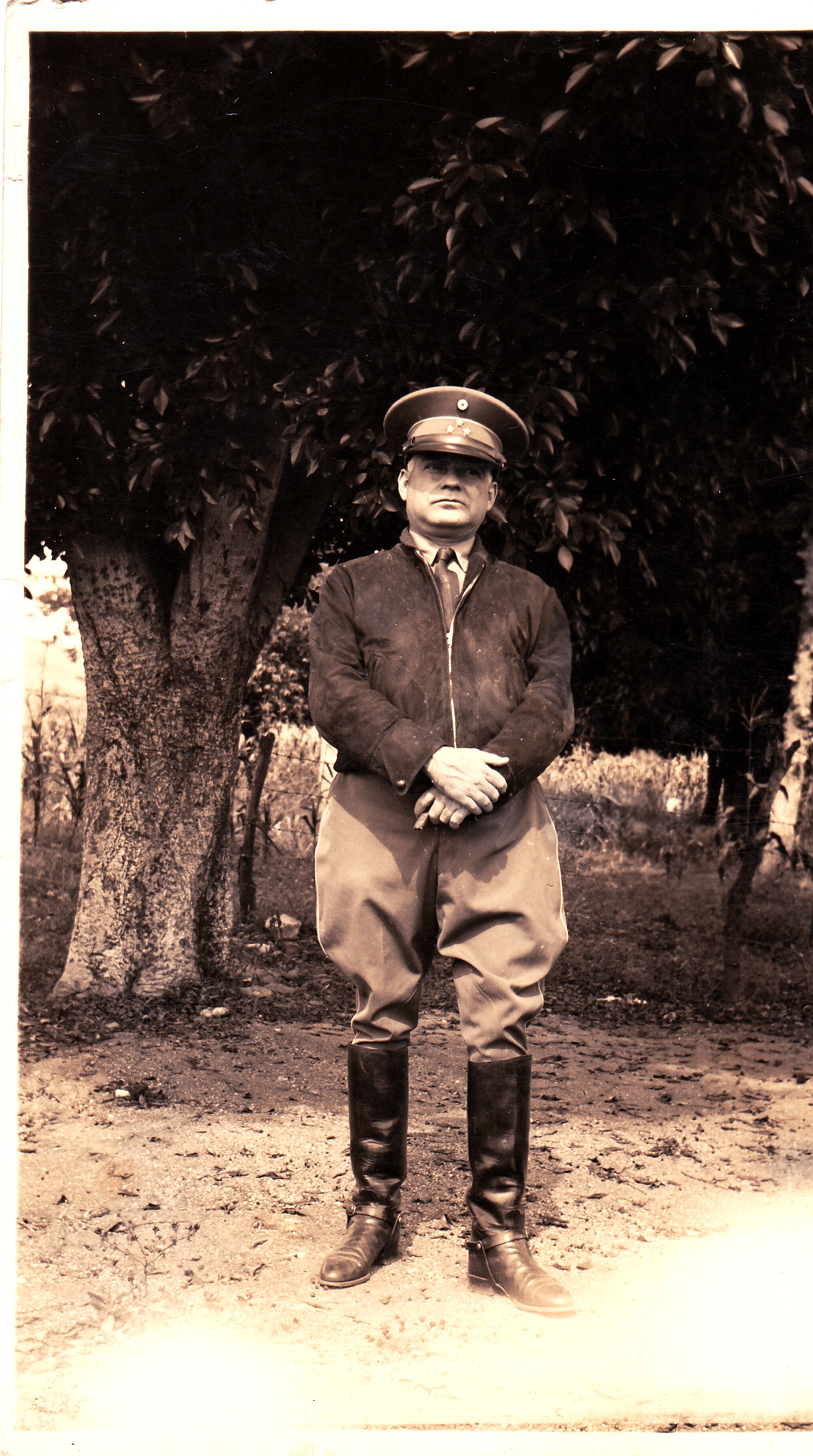 Fotografía tomada en Oaxaca, México en la década de 1940 cuando él era gobernador del Estado.